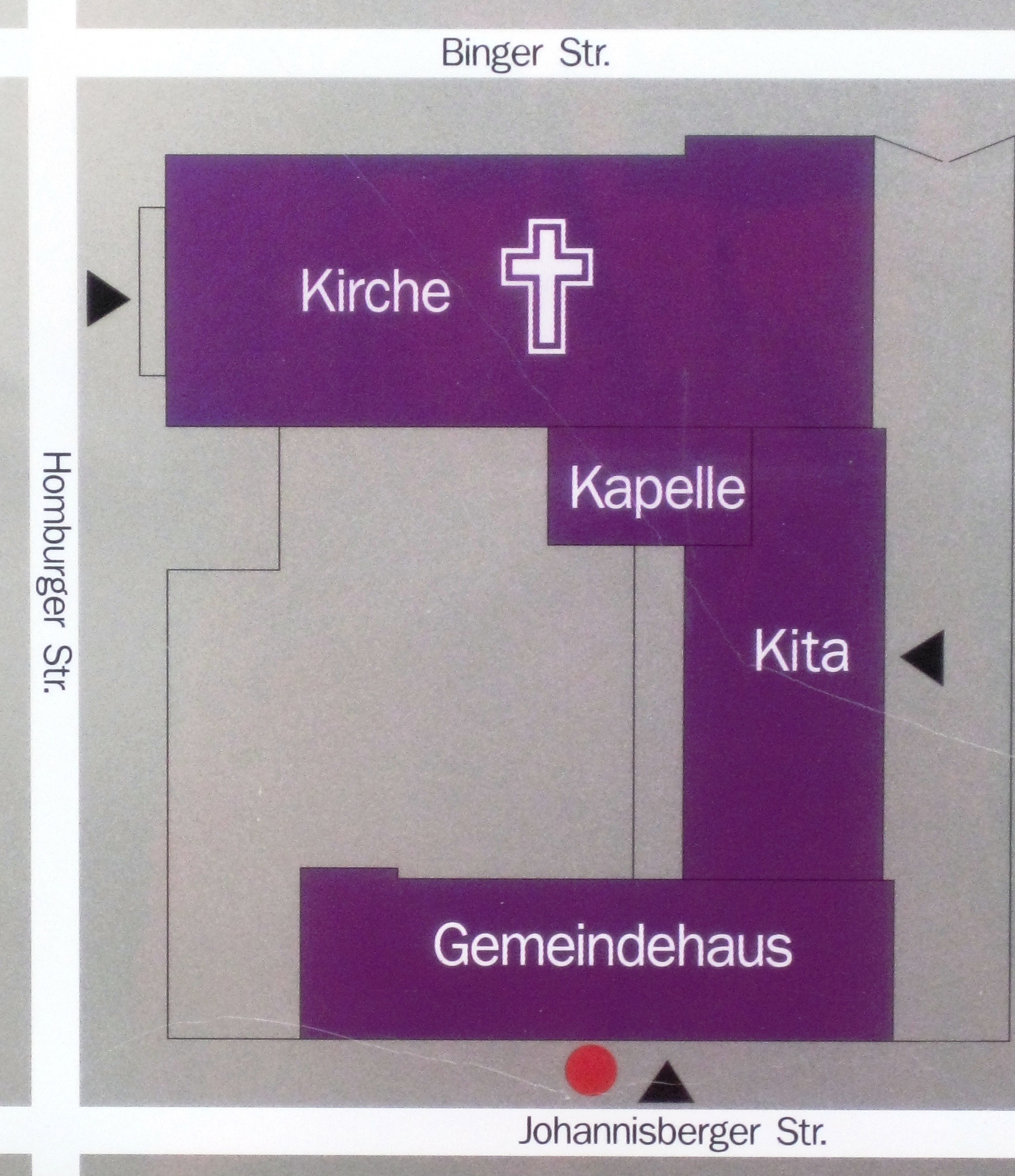 Grundriss des Ensembles auf einem Schild an der Straße (Lindenkirche (Berlin))